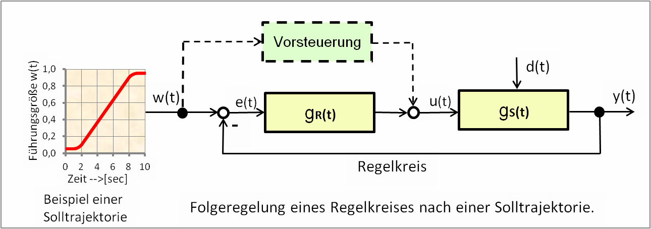 Folgeregelung nach einer Solltrajektorie